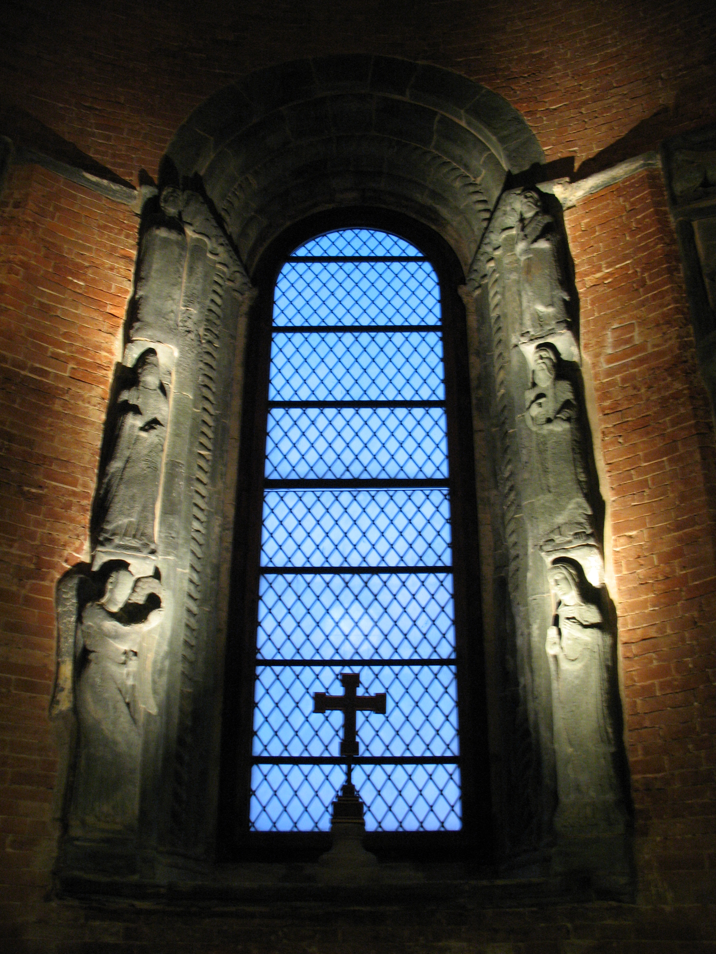 Sacra di San Michele, vetrata dell'altare - Valle di Susa